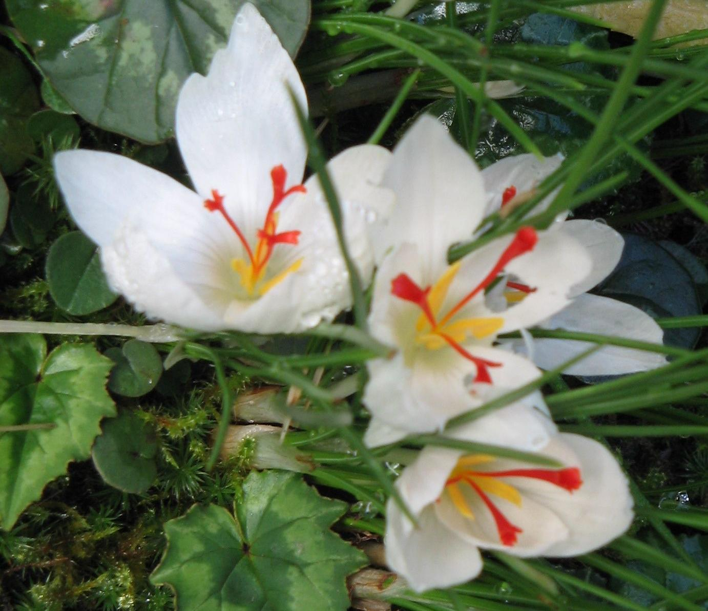 Détail de la fleur de Crocus cartwrightianus 'Albus' montrant les longs stigmates rouges